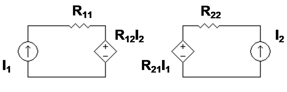 Z-equivalent two-port